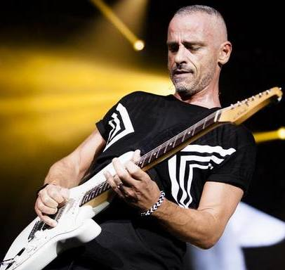 gira por europa perfetto